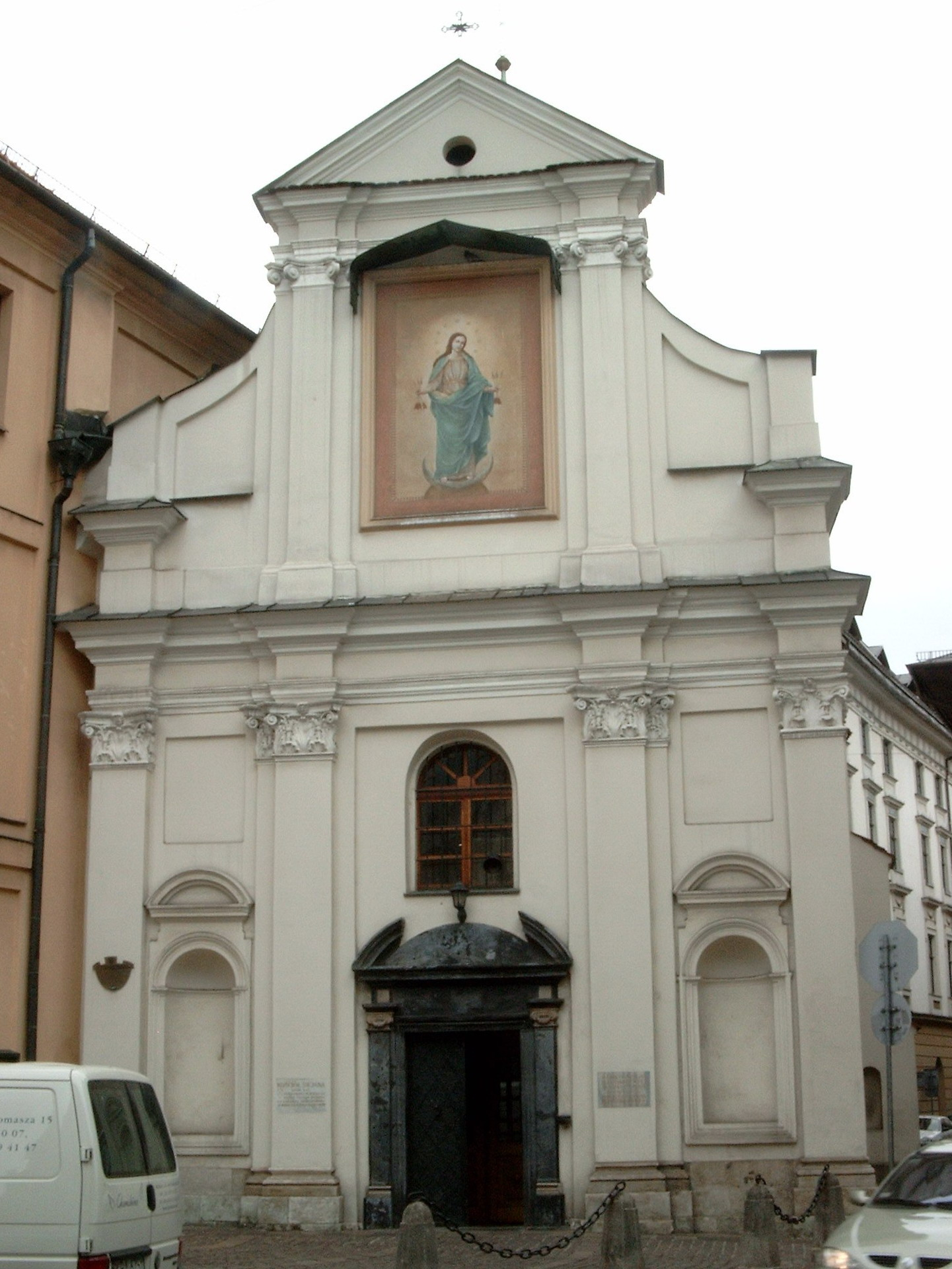 Kościół Kościół św. Jana Chrzciciela i św. Jana Ewangelisty przy ulicy św. Jana w Krakowie